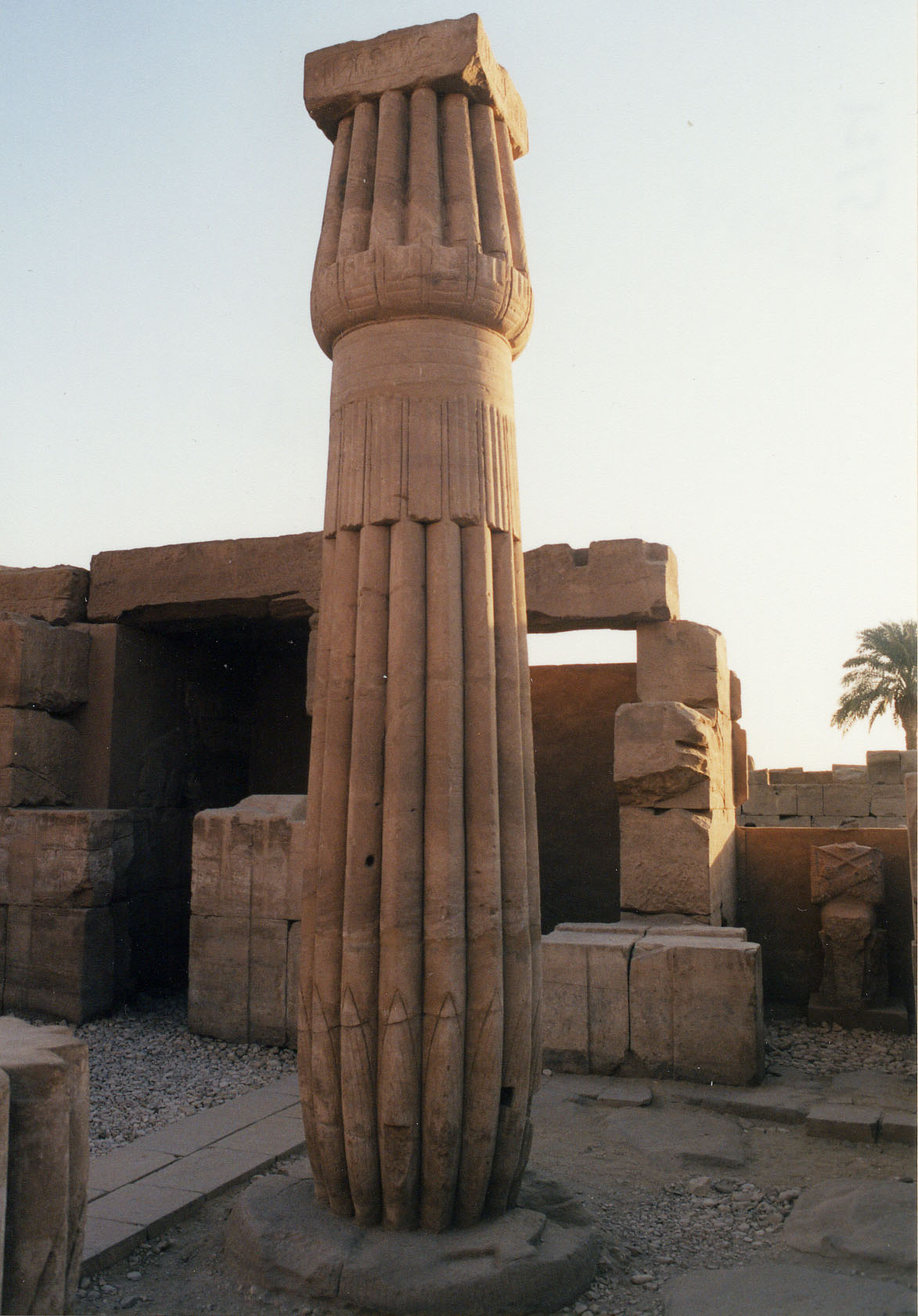 Karnak: una delle colonne "fascicolate" erette da Thutmosi III nel complesso di Amon